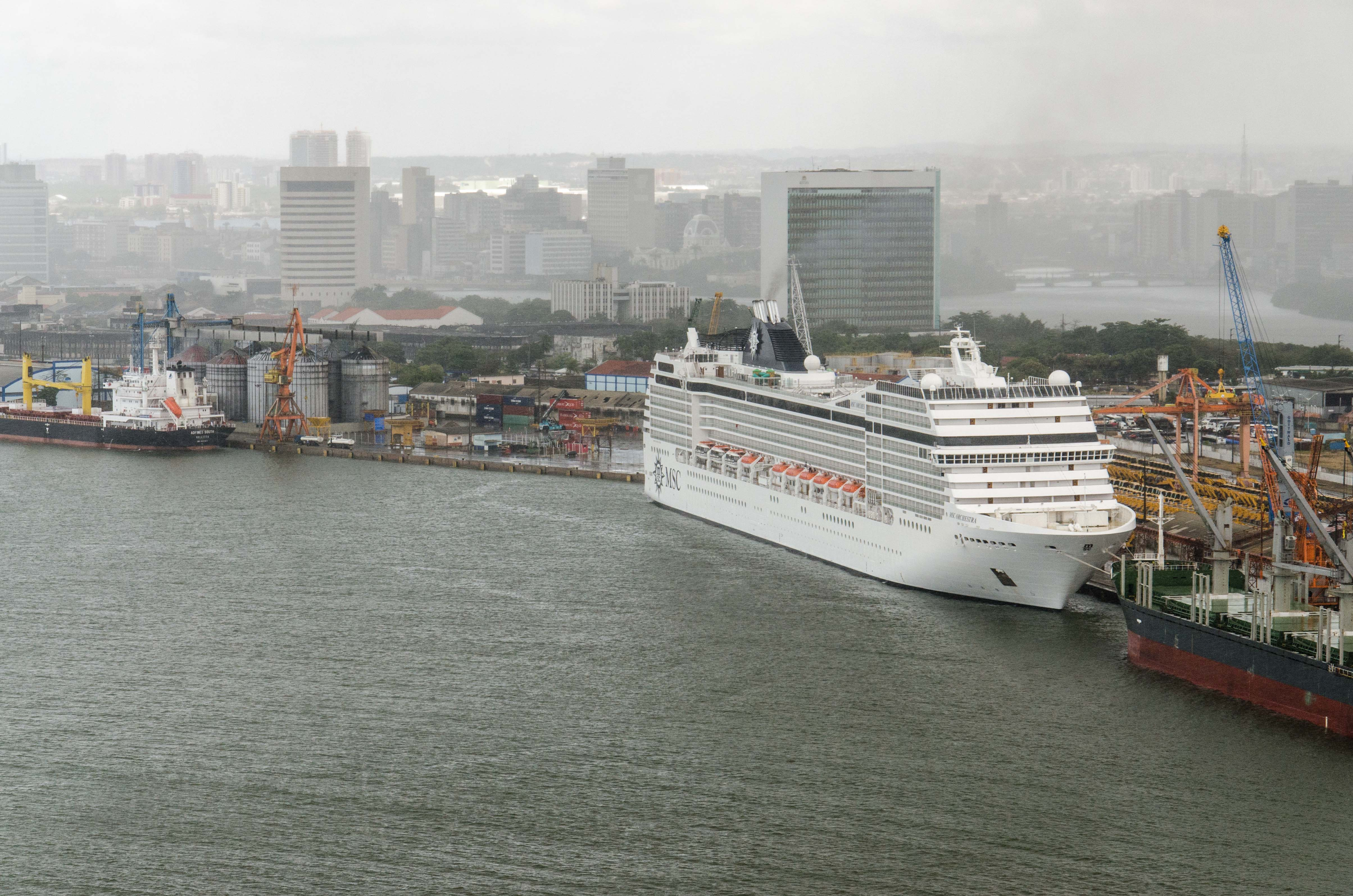 Vista áerea do Recife, Pernambuco, Brasil.